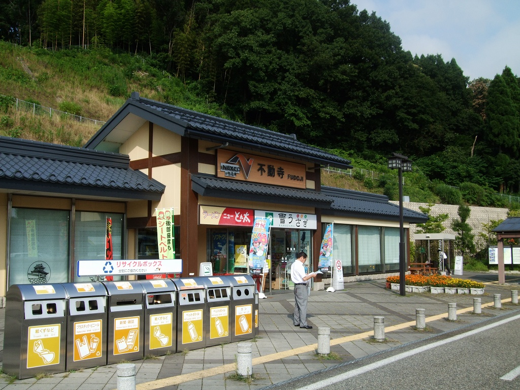 北陸自動車道 不動寺パーキングエリア（下り線・新潟方面）